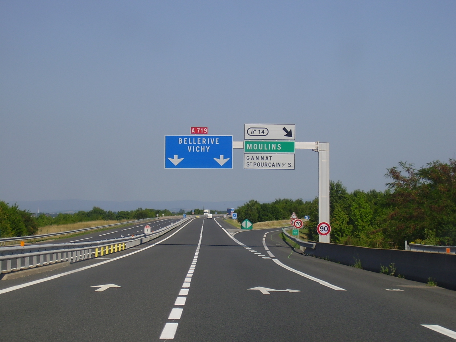 A719 kilomètre 7, vers Bellerive-sur-Allier et Vichy, au kilomètre 7, à Gannat (Allier, Auvergne, France).